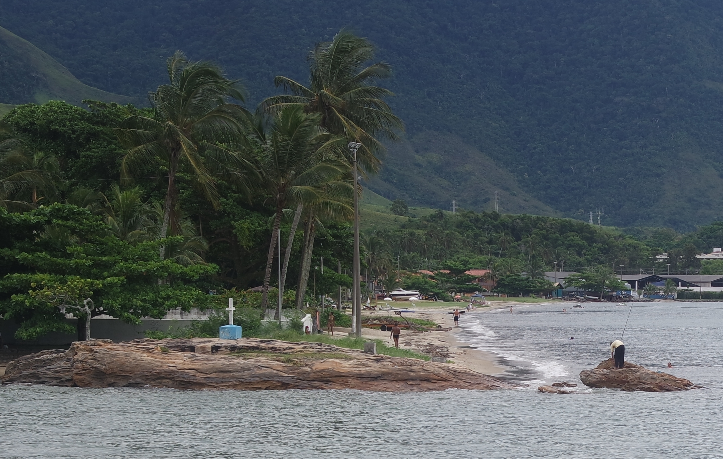 Local do antigo Forte do Pontal da Cruz. Só restou o cruzeiro. O local foi ocupado por construções. Cultural propertyQ10284127, São Paulo (state), Brazil Q10284127, P727